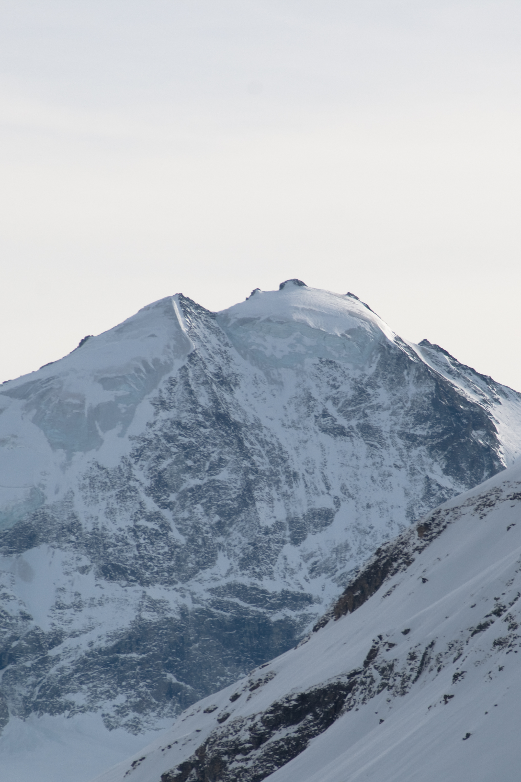 Le Mont Durand dans les Alpes valaisannes, vu depuis les pentes de la Corne de Sorebois.